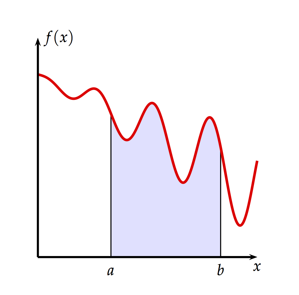 Viser integralet af en funktion som arealet under kurven